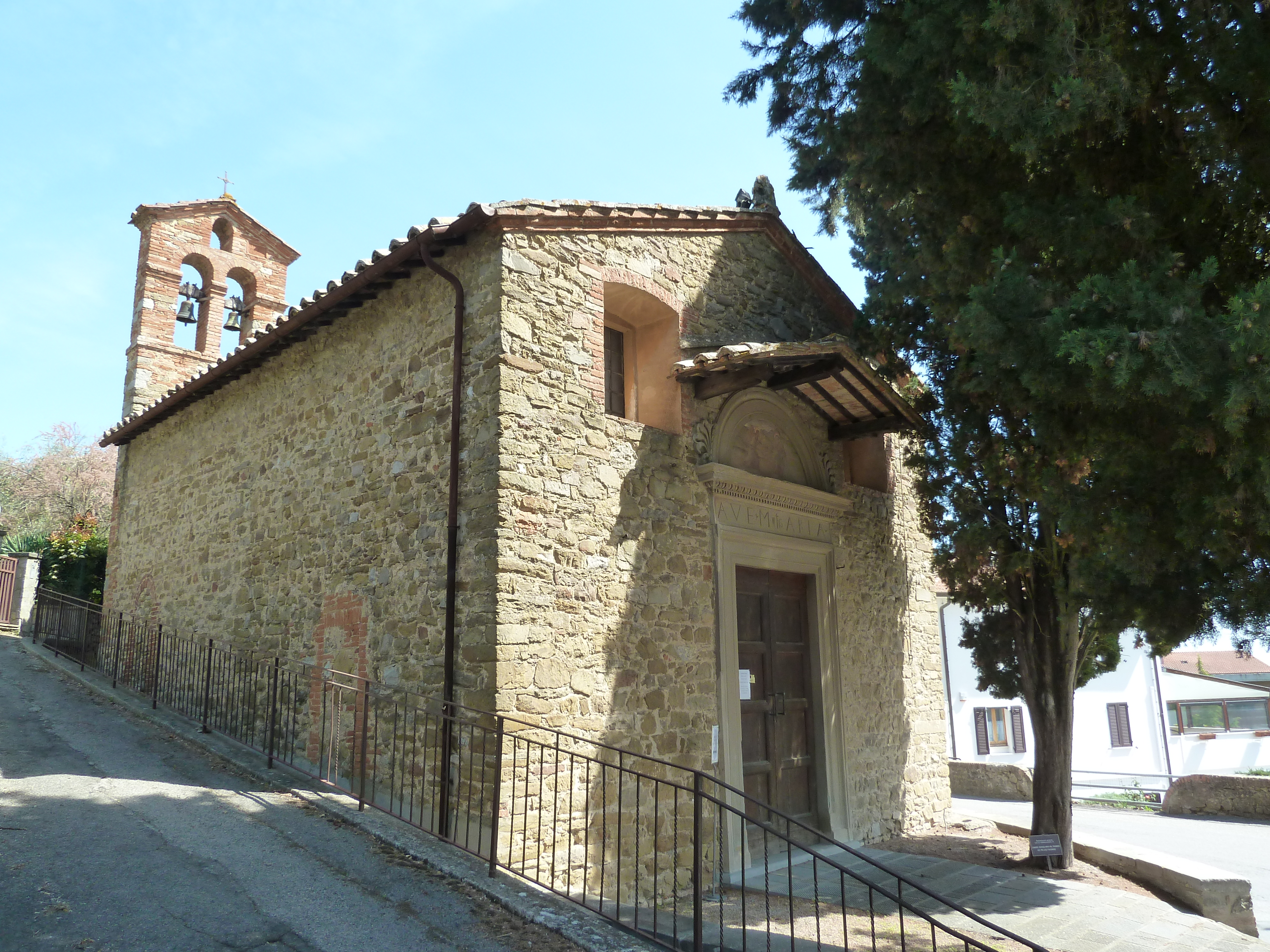 Eglise musée santa Maria Annunziata- Fontignano- Ombrie-Italie